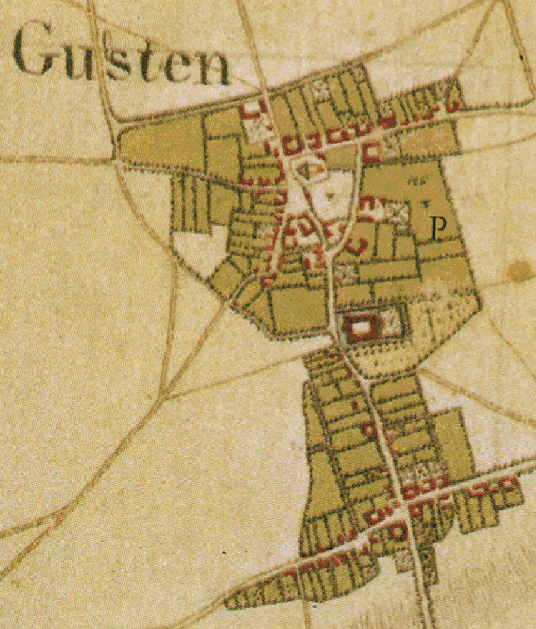 Jülich Güsten, Ausschnitt aus der sog. Tranchot-Karte